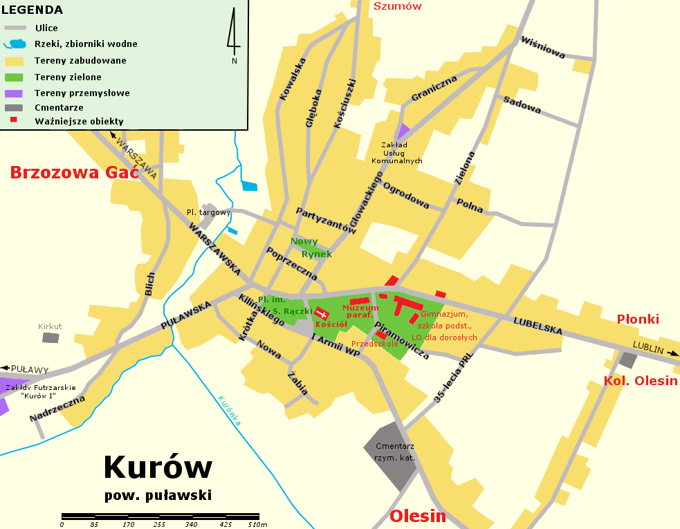 Plan Kurowa (pow. Puławy).